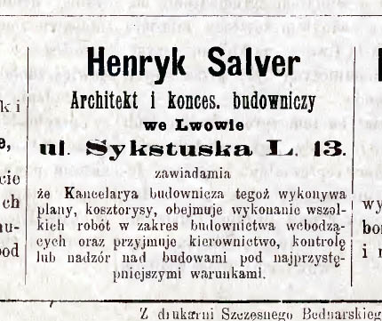 Оголошення архітектора Генрика Сальвера (1858—?) в газеті Głos Wolny від 1 травня 1893 року.